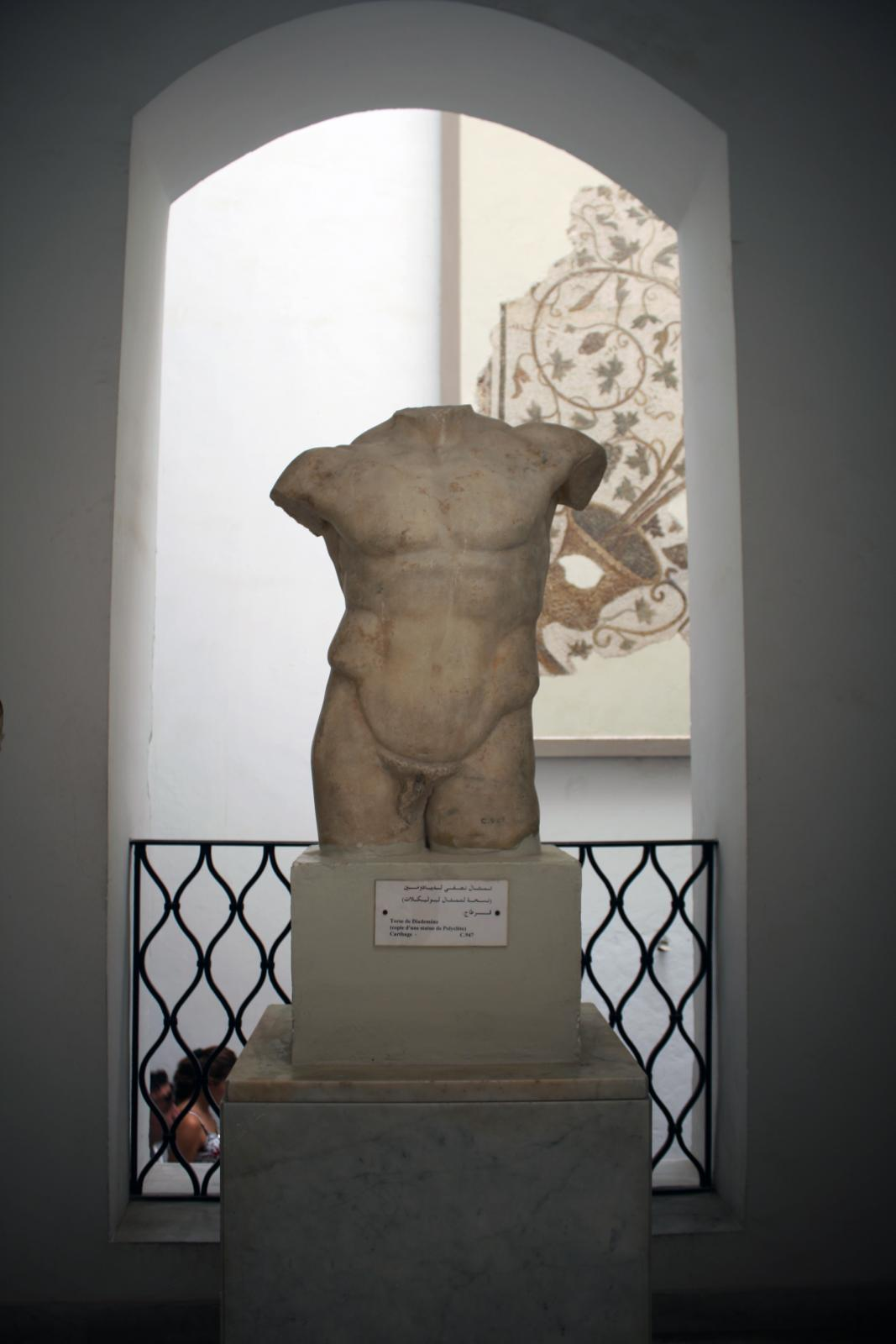 Torse de Diademène au musée du Bardo à Tunis (pièce C.947)